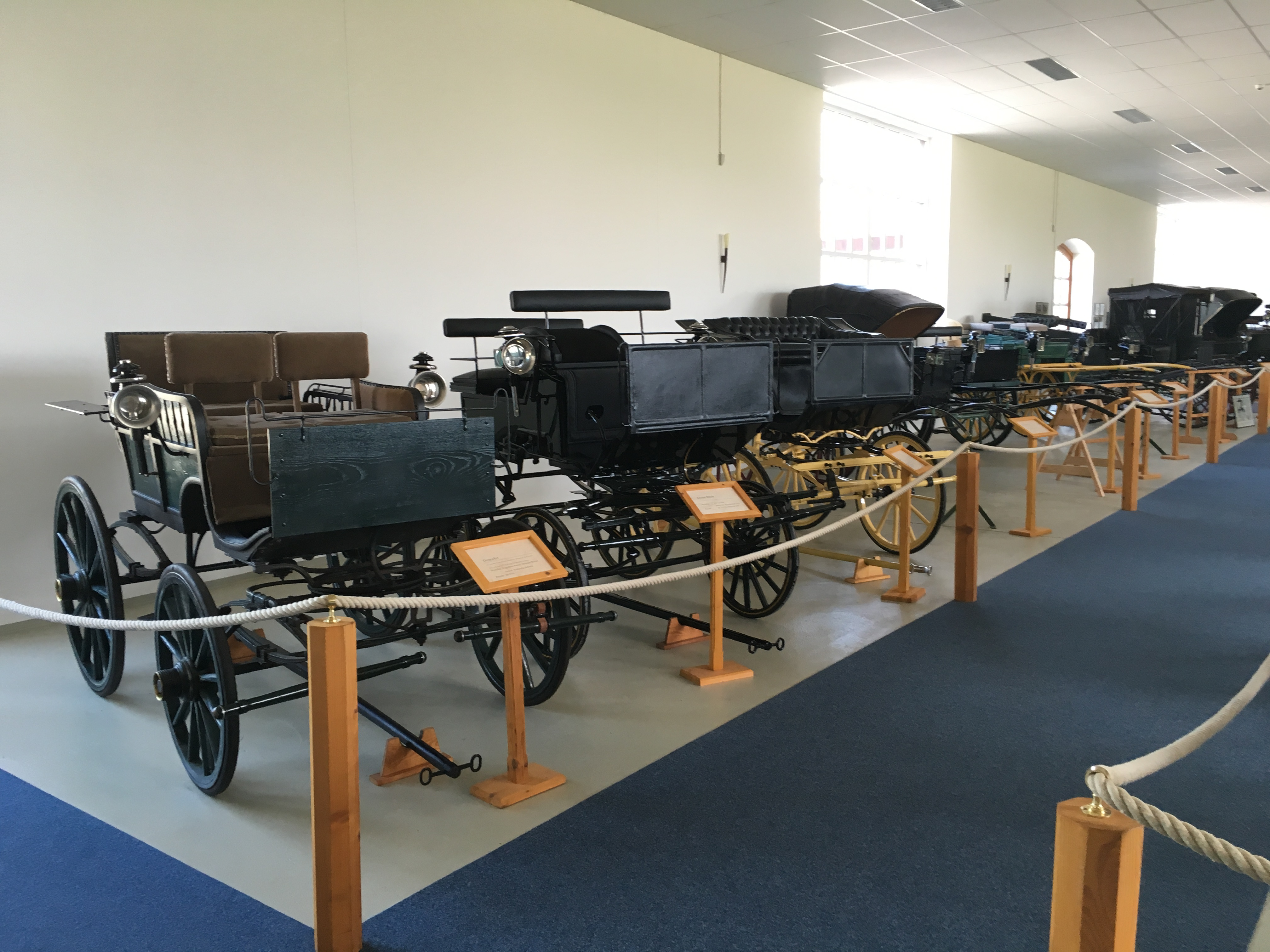 Mecklenburgisches Kutschenmuseum Kobrow